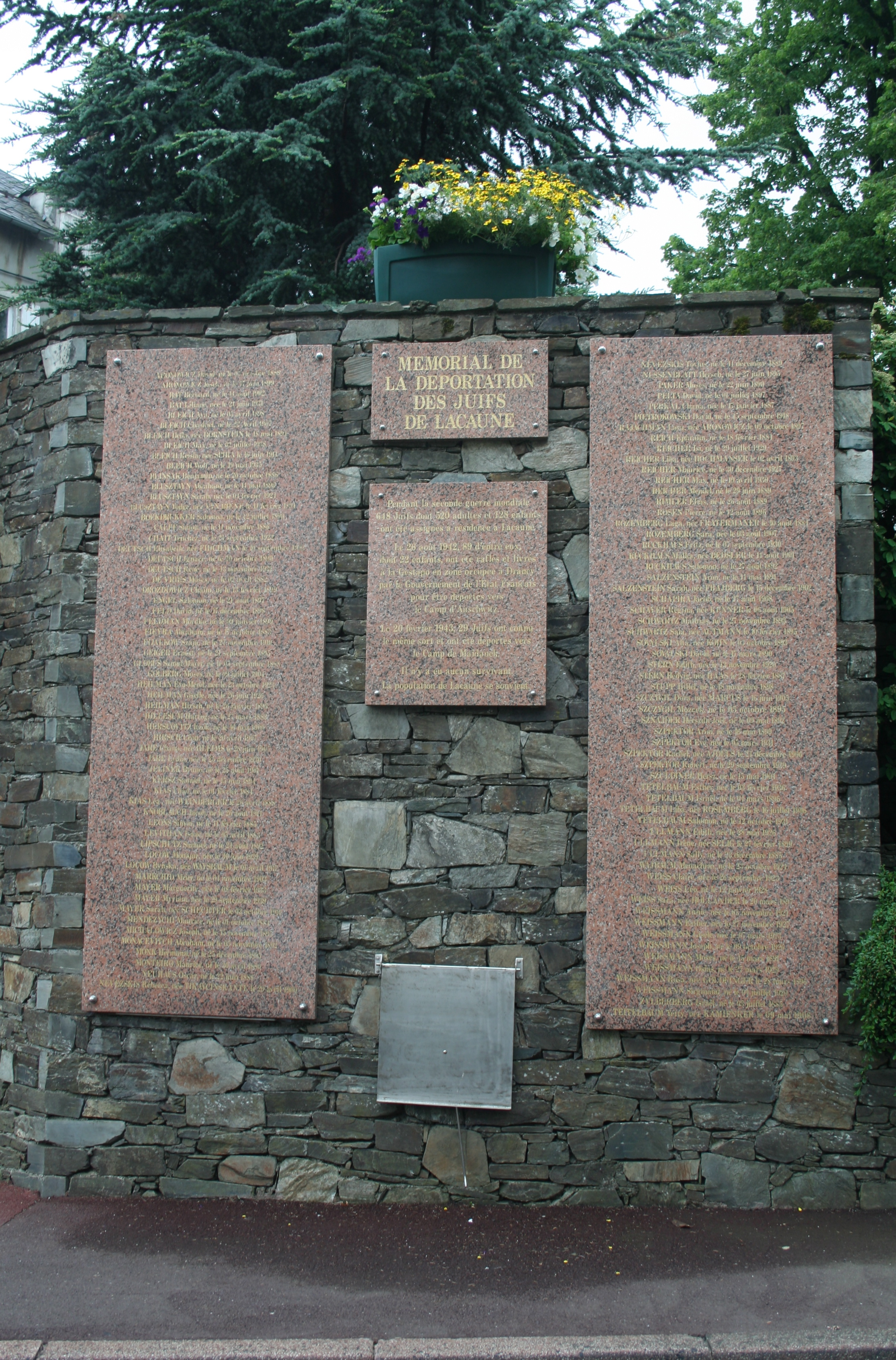 Lacaune (Tarn) - Mémorial de la déportation des 119 juifs de Lacaune. Le 26/8/1942, 90 juifs ont été arrêtés déportés à Drancy puis Auschwitz. Le 20/2/1943, 29 hommes ont été déportés vers Maidanek. Mémorial inauguré le 17/4/1999.